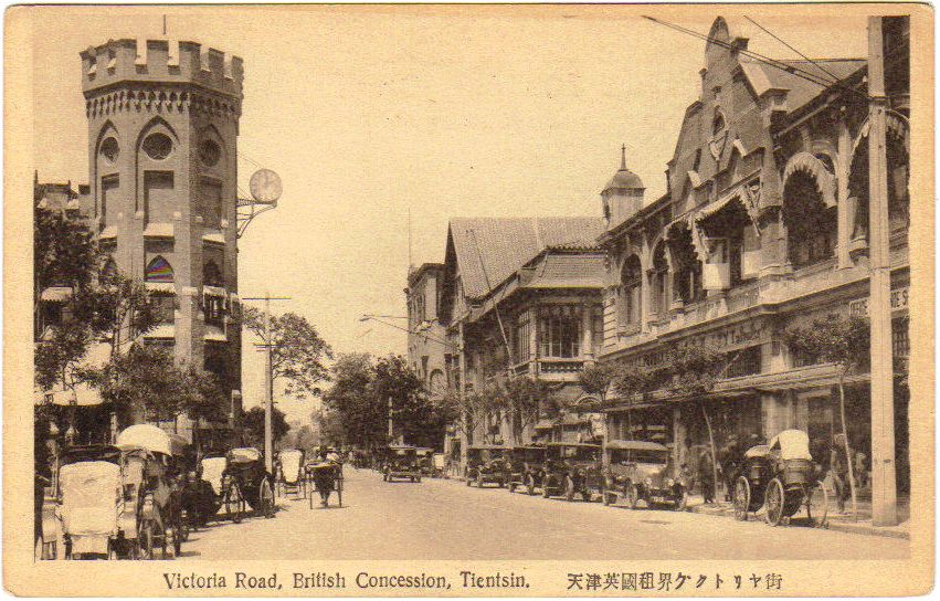 天津英租界维多利亚道，日本发行的明信片